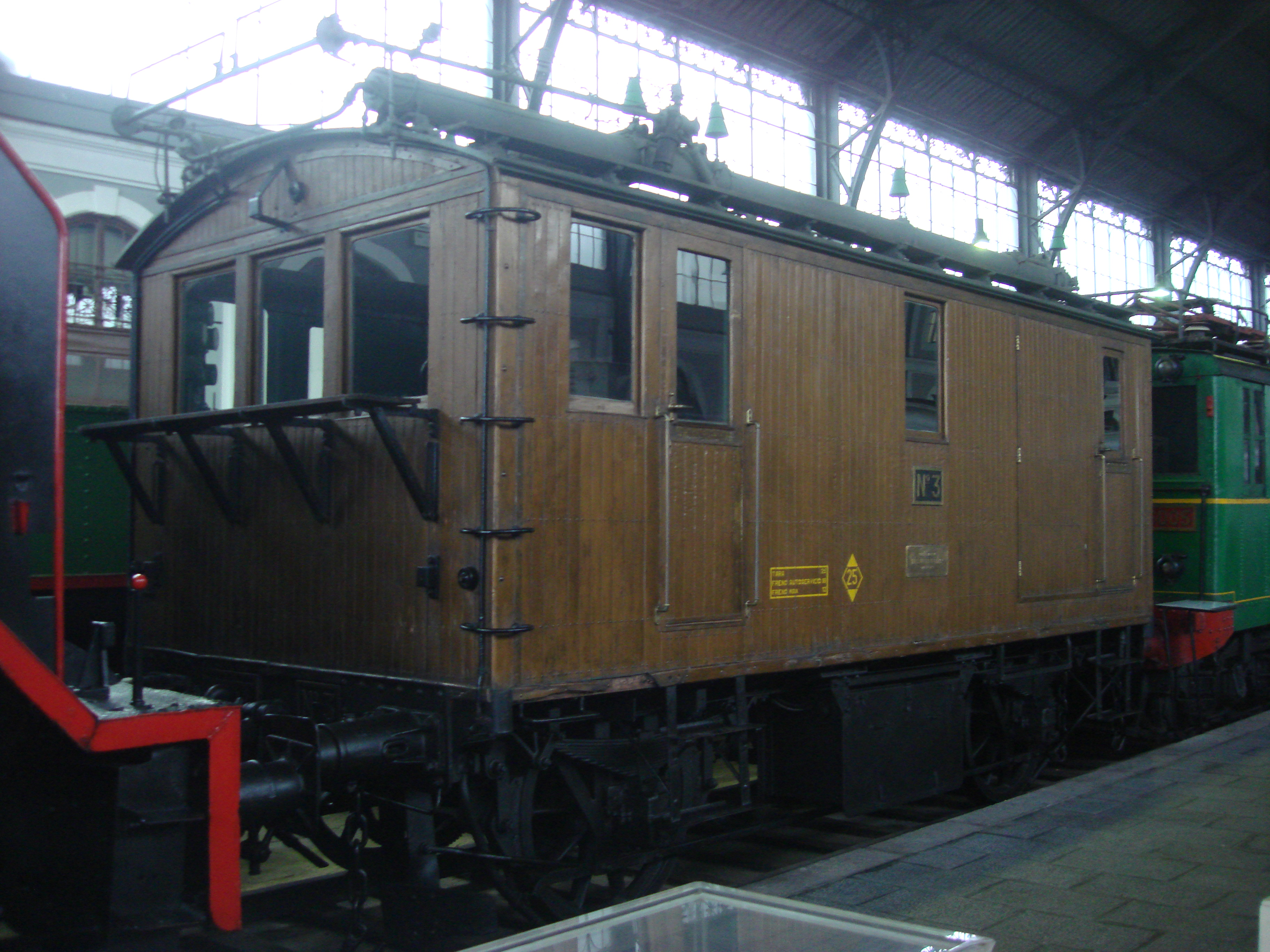 Own work